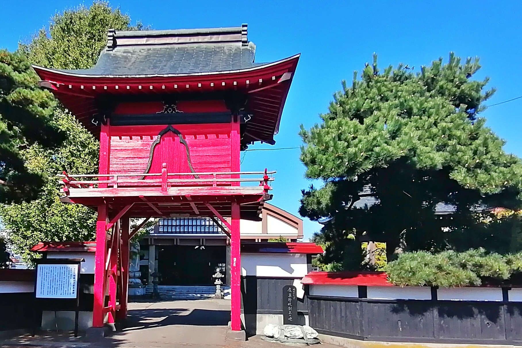 浄運寺-北秋田市米代町